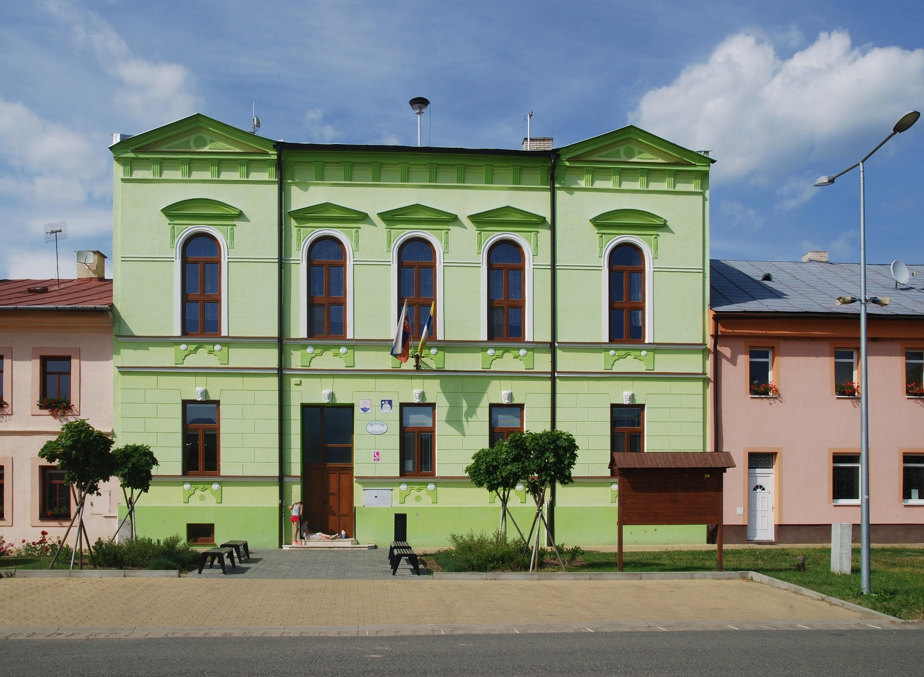 wieś Tvarožná (okres Kežmarok)